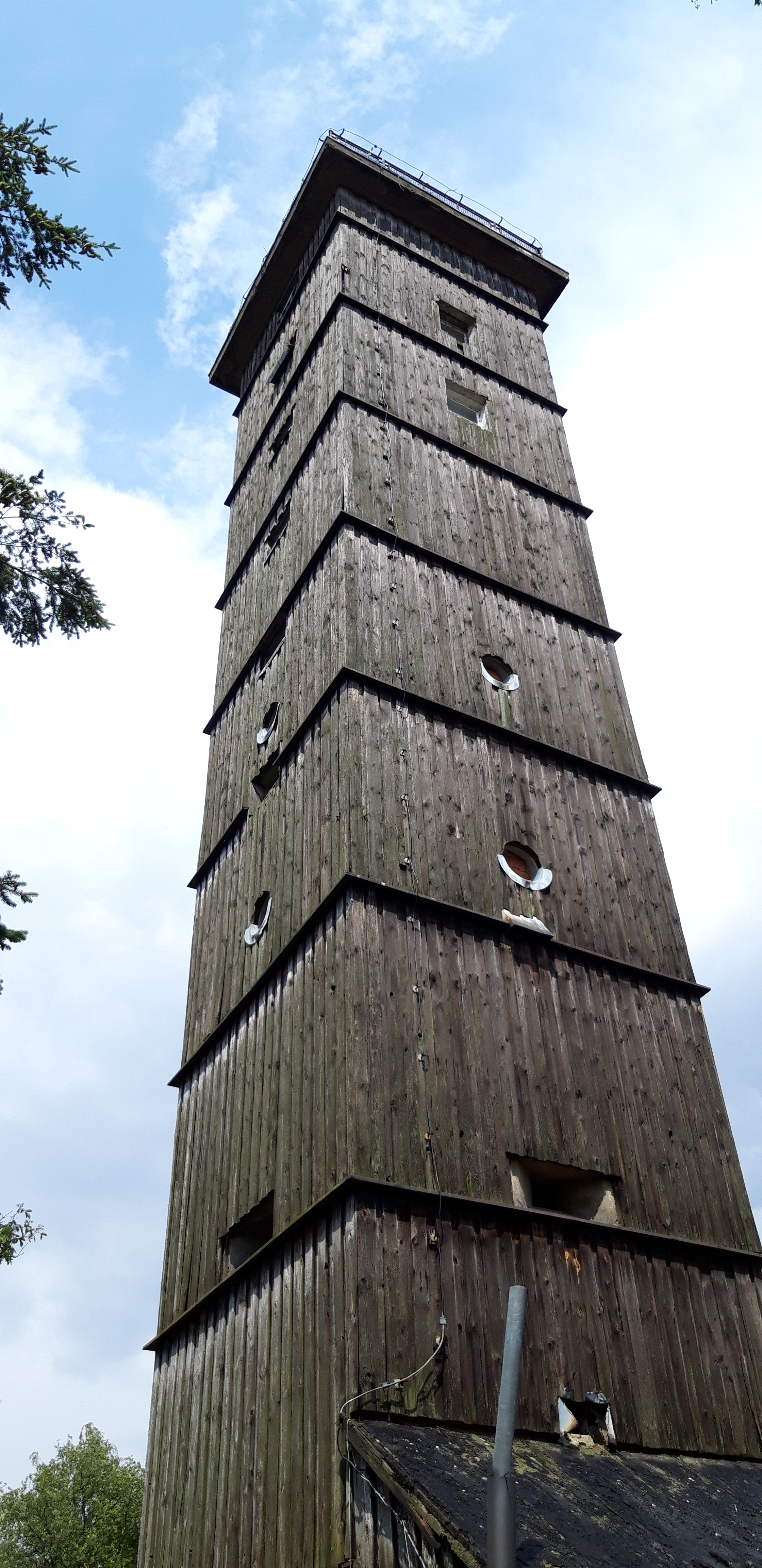 B-Turm